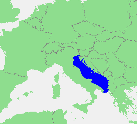 In dutch: Locatie Adriatische zee.PNG